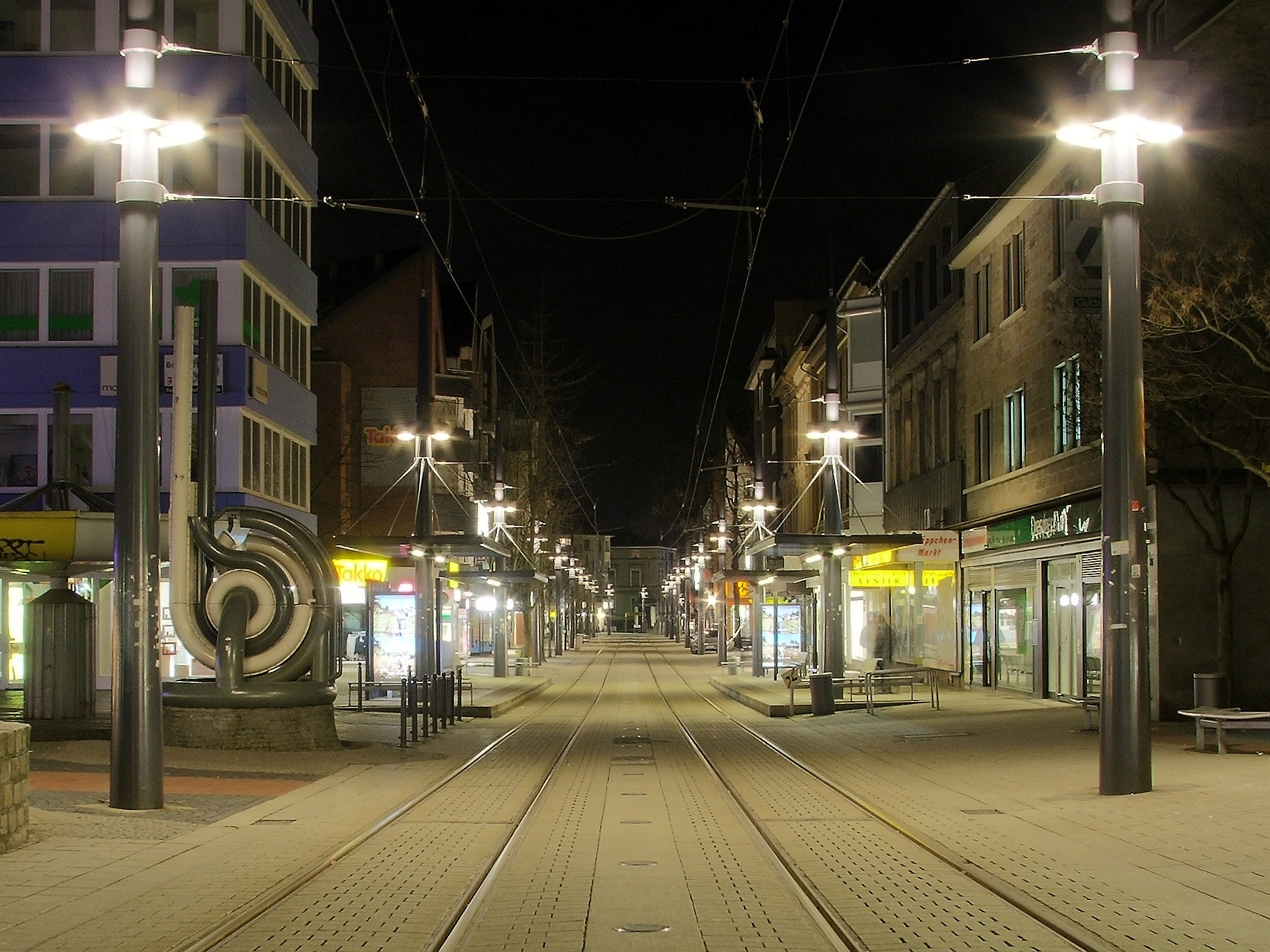 Einkaufsmeile Witten Zentrum